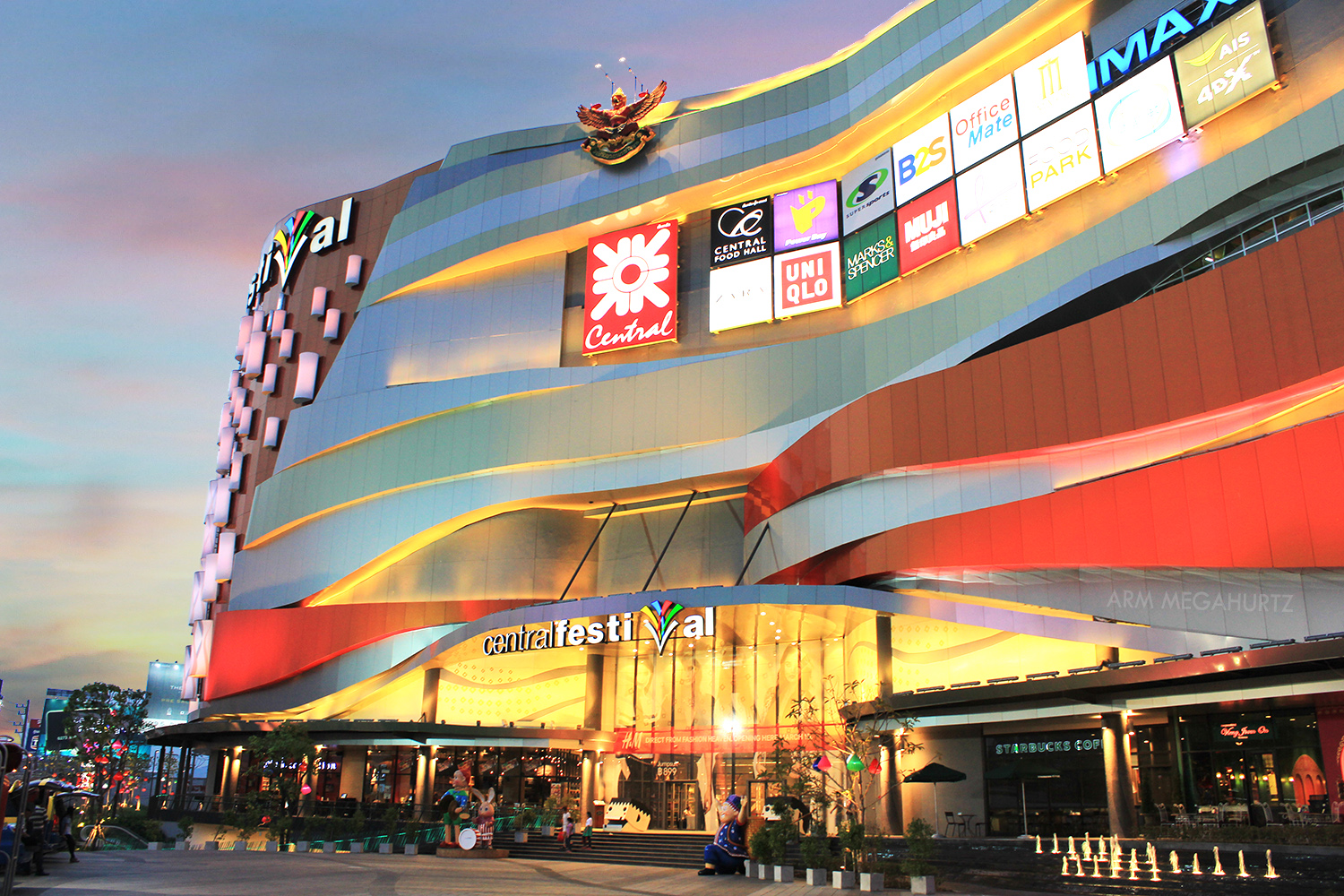 ศูนย์การค้าเซ็นทรัลเฟสติวัล เชียงใหม่